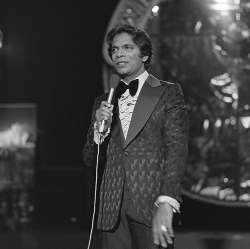 Kamahl in het Nederlandse televisieprogramma Kwistig met muziek in 1977